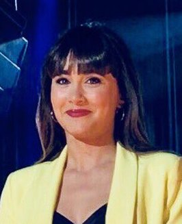 La cantante española Aitana el 1 de junio de 2018 en Málaga